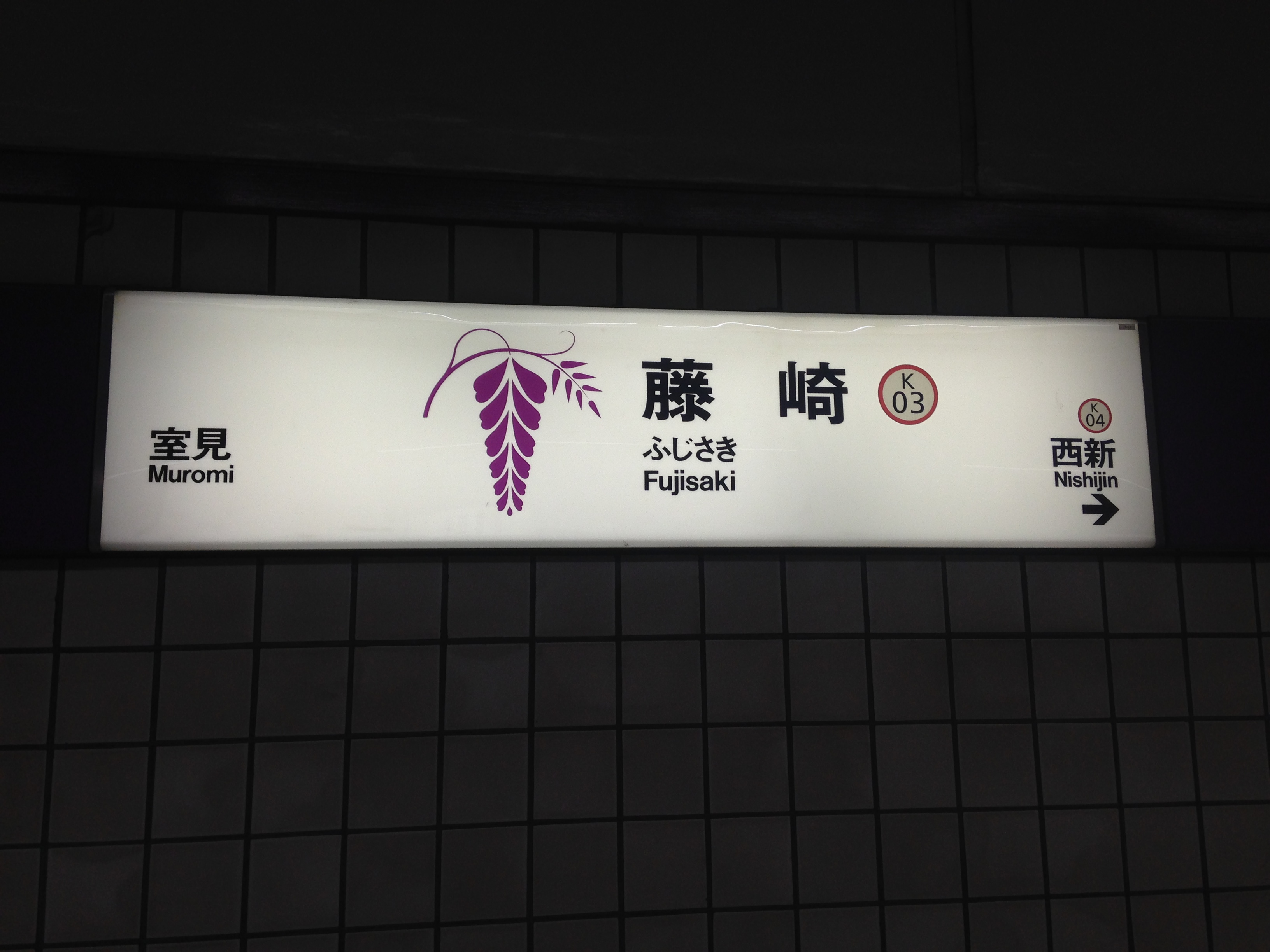 藤崎駅(福岡市営地下鉄)の駅名標。イラストは「藤崎」にちなんでフジ